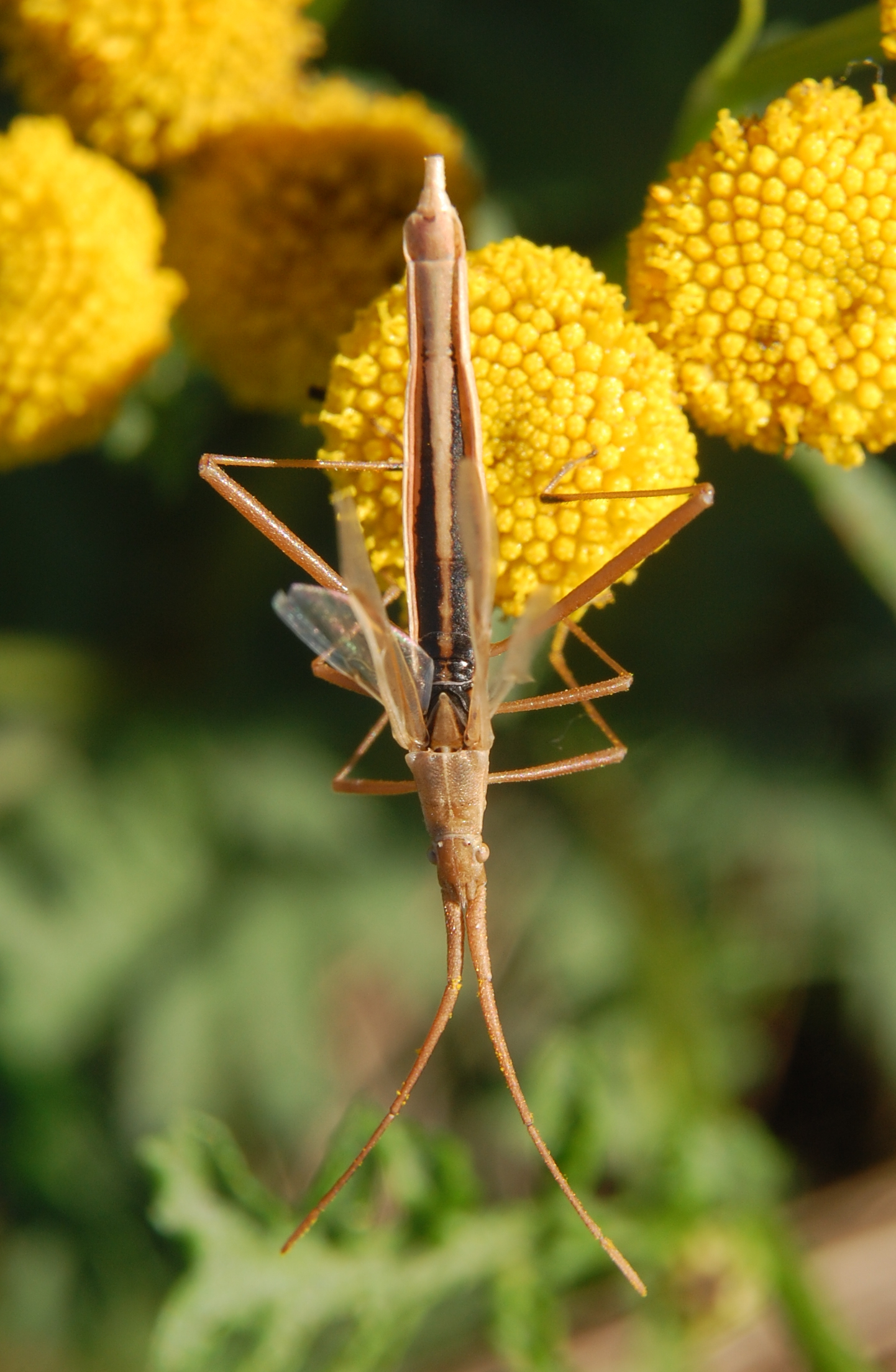 Chorosoma schillingii (Rhopalidae), Berlin Pankow, auf trockener Brache. Ansicht von oben.